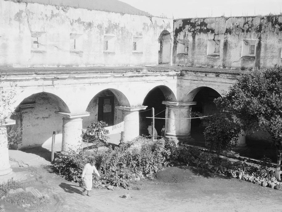 Familias de escasos recursos que habitaban en las ruinas del Convento de Capuchinas en Antigua Guatemala en 1916.